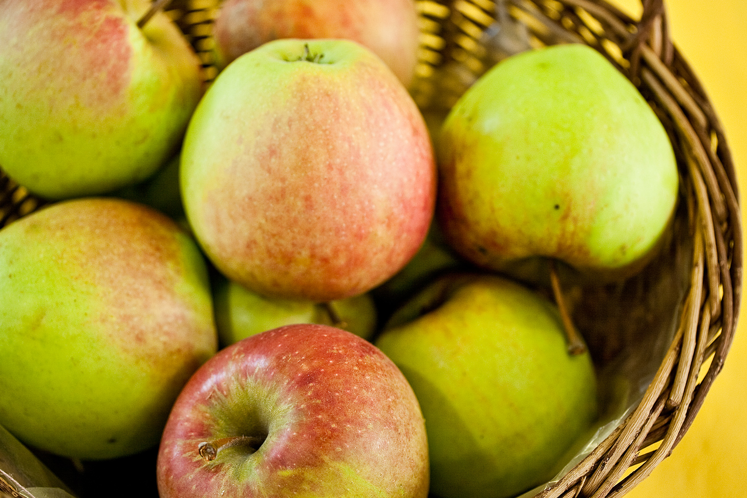 Der Delbard Jubilée ist eine Apfelsorte